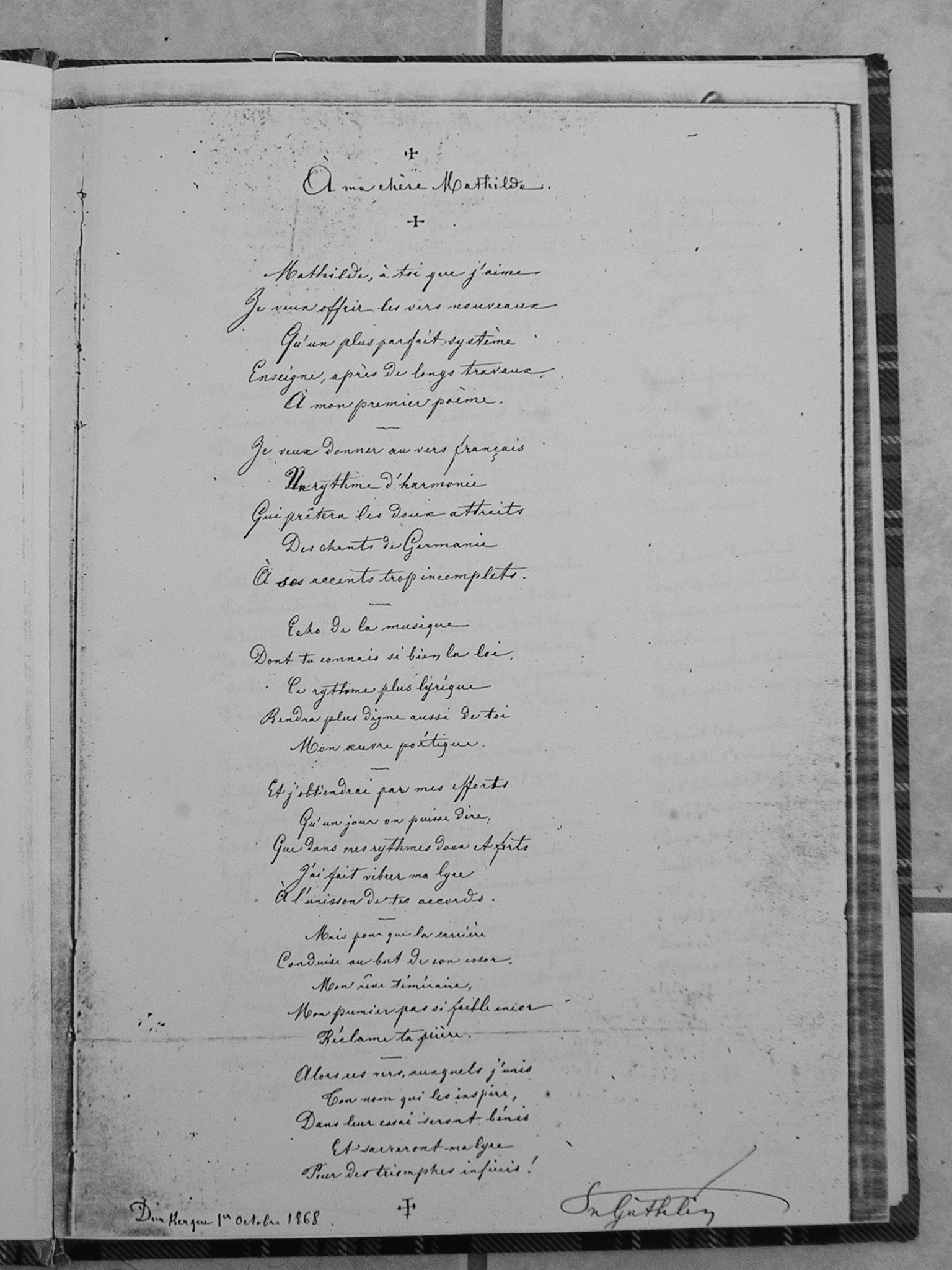 Premier poème du recueil Paroles ailées de Philippe Guthlin, écrit le 1er octobre 1868, intitué Ô ma chère Mathilde